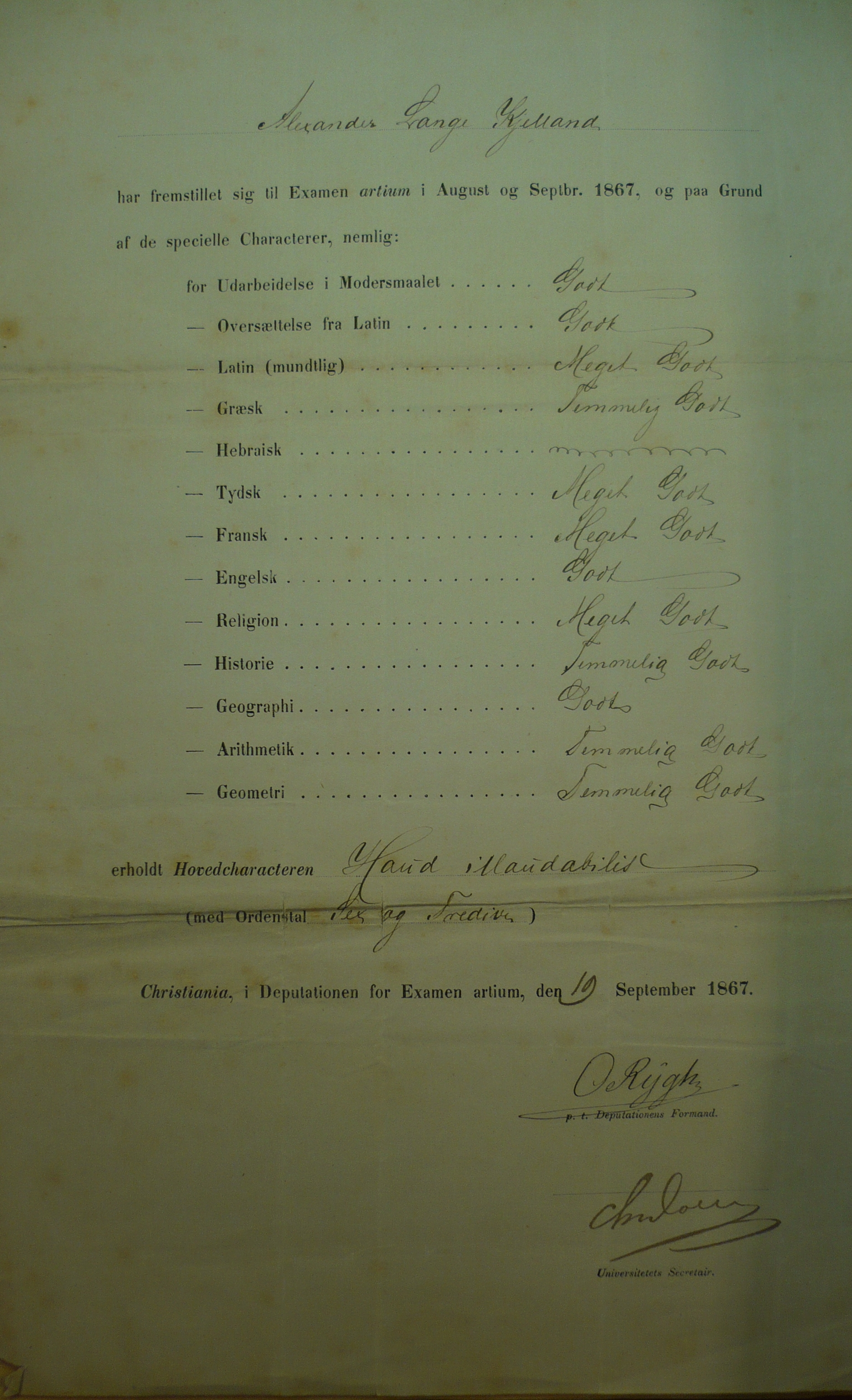 Eksamen artiums vitnemål for Alexander Lange Kielland fra september 1867.